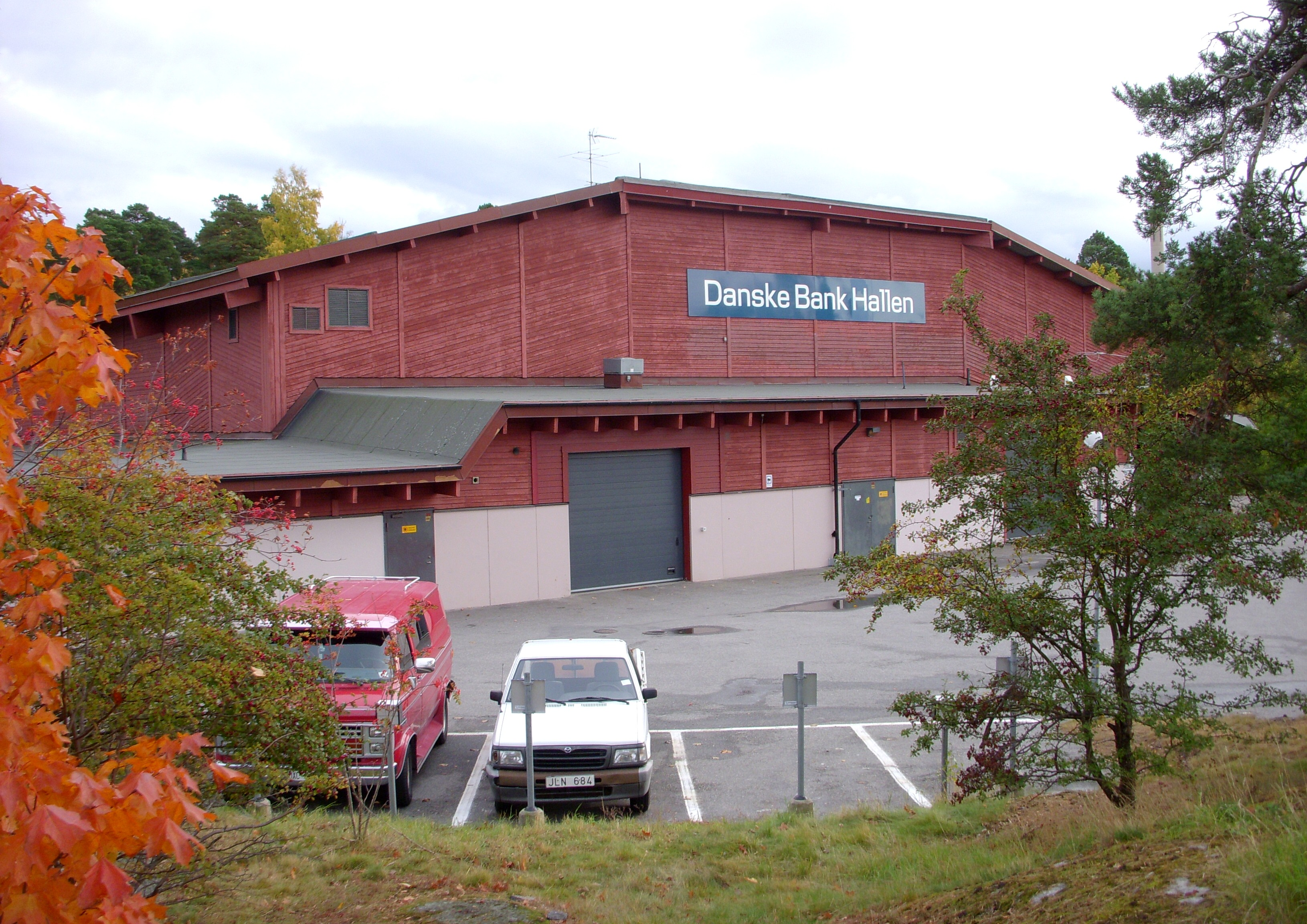 "Danska Bank Hallen" (före detta "Dalénhallen") på Lidingö